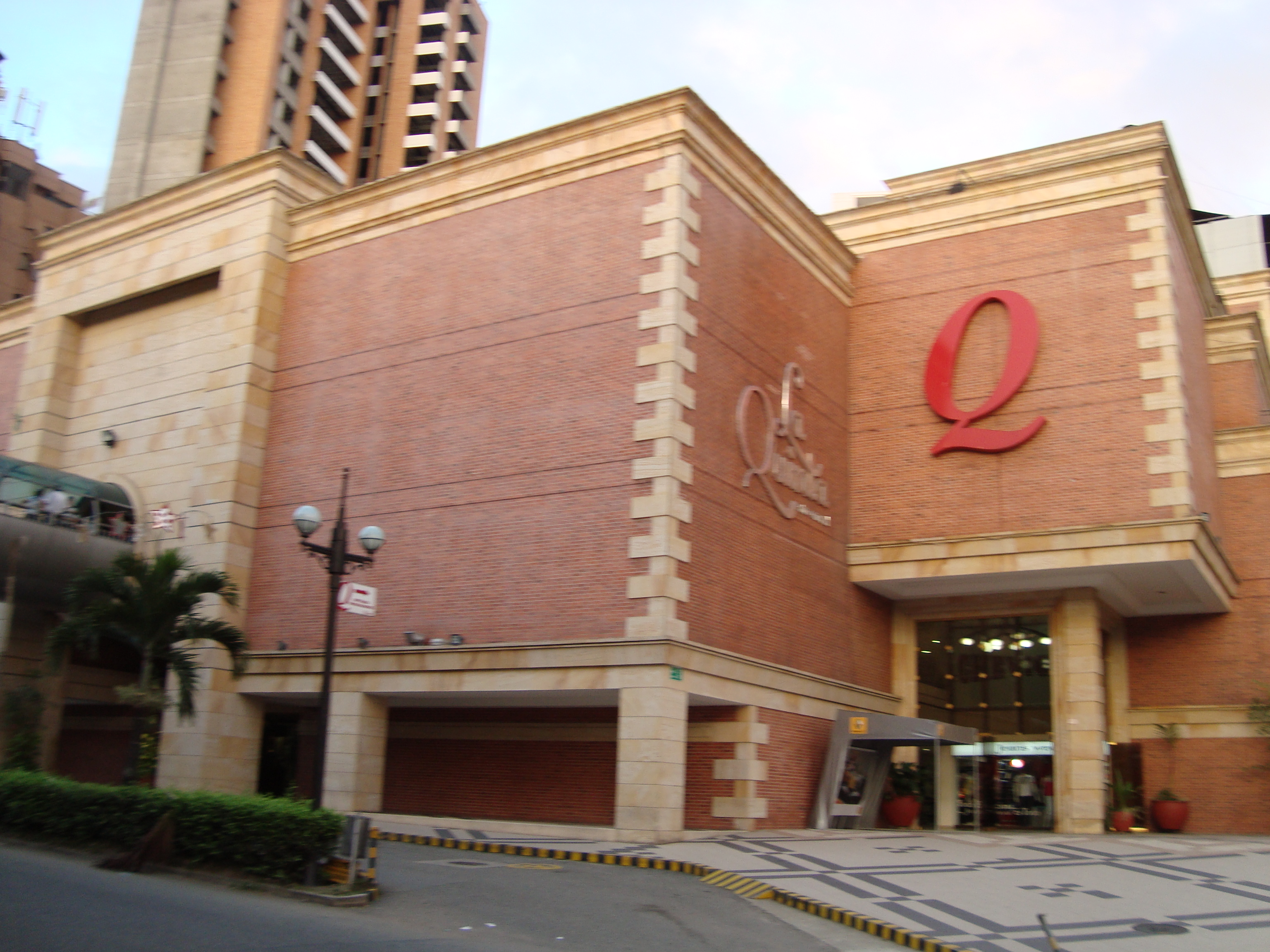 La quinta (centro comercial) - Bucaramanga, Colombia.